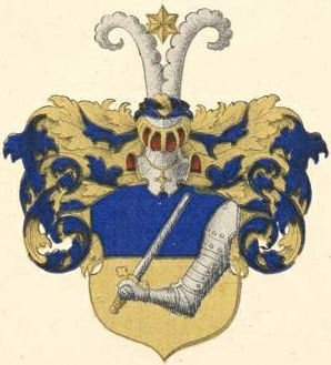 Silberarmi suguvõsa aadlivapp